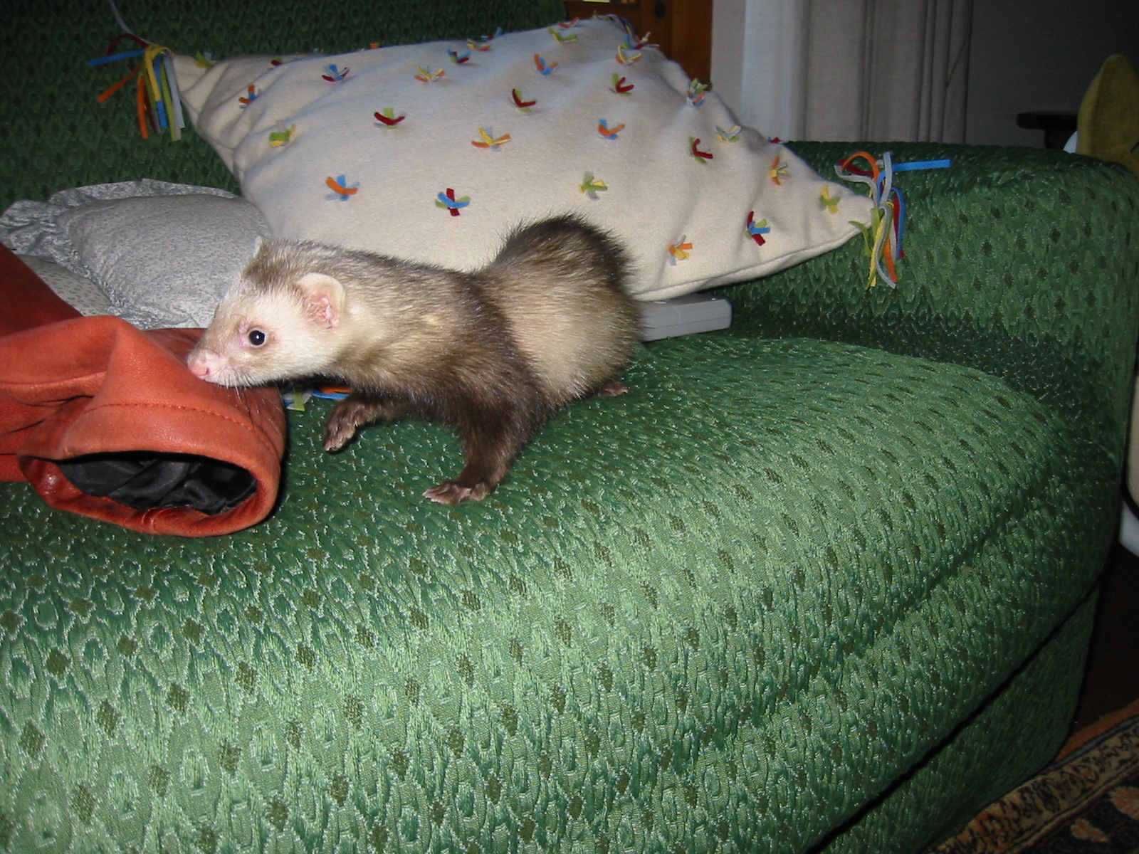 Mirò